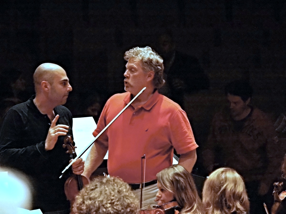 Gregory Kunde při nastudování opery Vilém Tell G. Rossiniho, Valladolid 2010